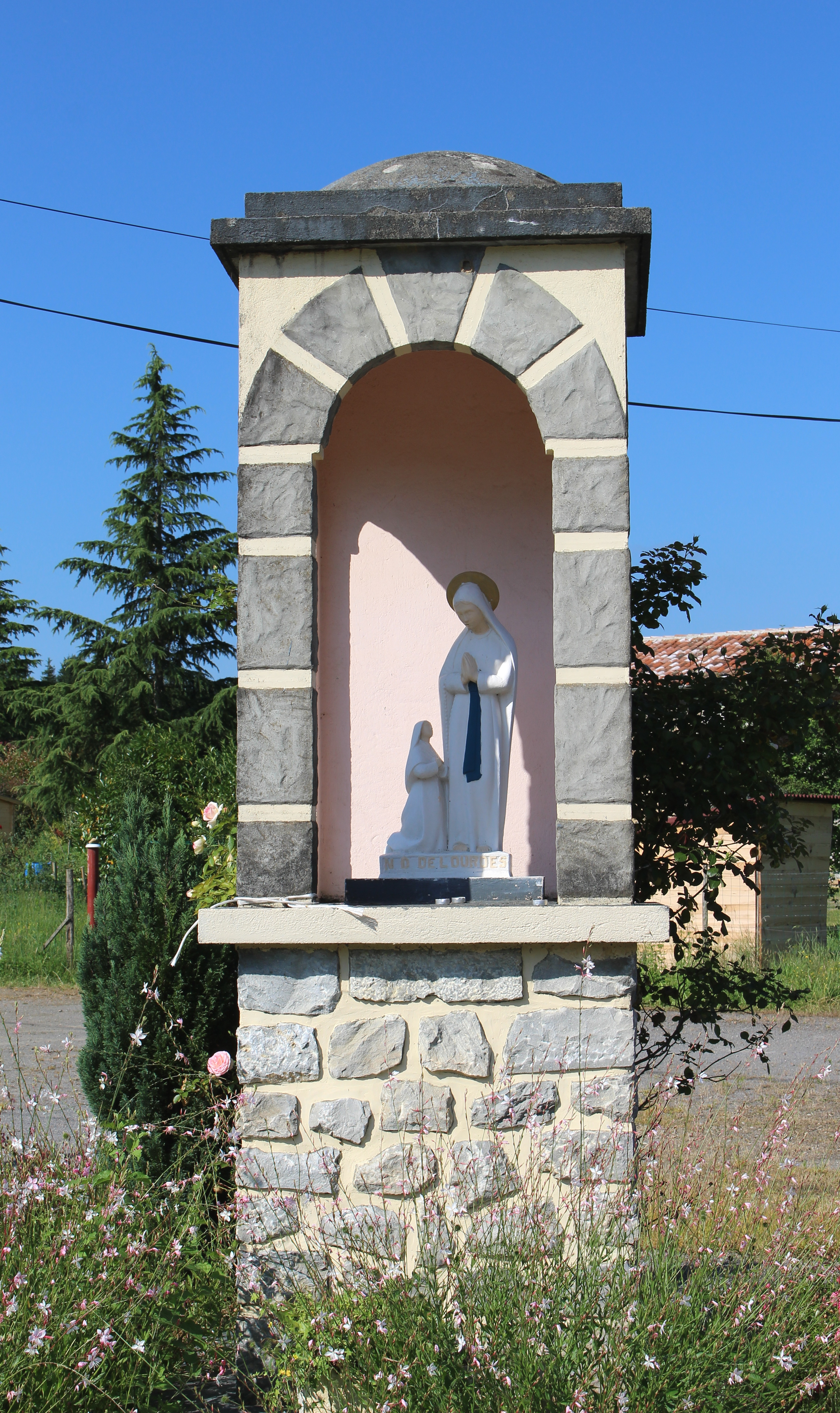 Oratoire de Galez (Hautes-Pyrénées)